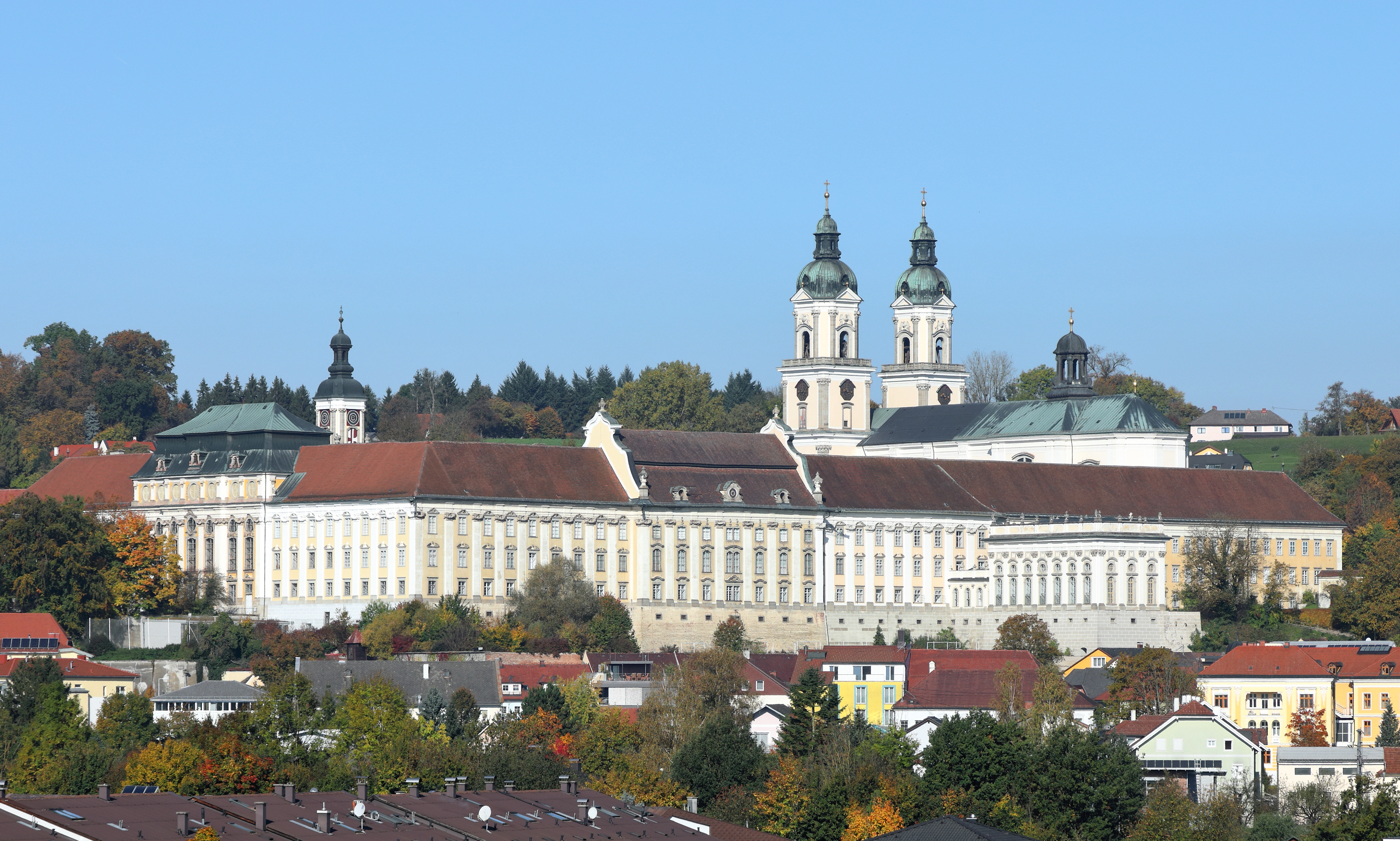 Südostansicht des Stiftes Sankt Florian in der oberösterreichischen Marktgemeinde St. Florian bei Linz. Wann das Kloster gegründet wurde ist unbekannt, jedoch erste schriftliche Zeugnisse einer Klosteranlage gehen auf karolingische Zeit zurück (um 800 n. Chr.). Von 1668 bis in die Mitte des 18. Jahrhunderts erfolgte eine weitgehende Neuerrichtung des Stiftes unter Einbeziehung älterer Bausubstanz. Der Neubau zählt zu den glänzendsten Leistungen des österr. Barockbaues, der vorwiegend von dem Baumeister Carlo Antonio Carlone realisiert wurde.